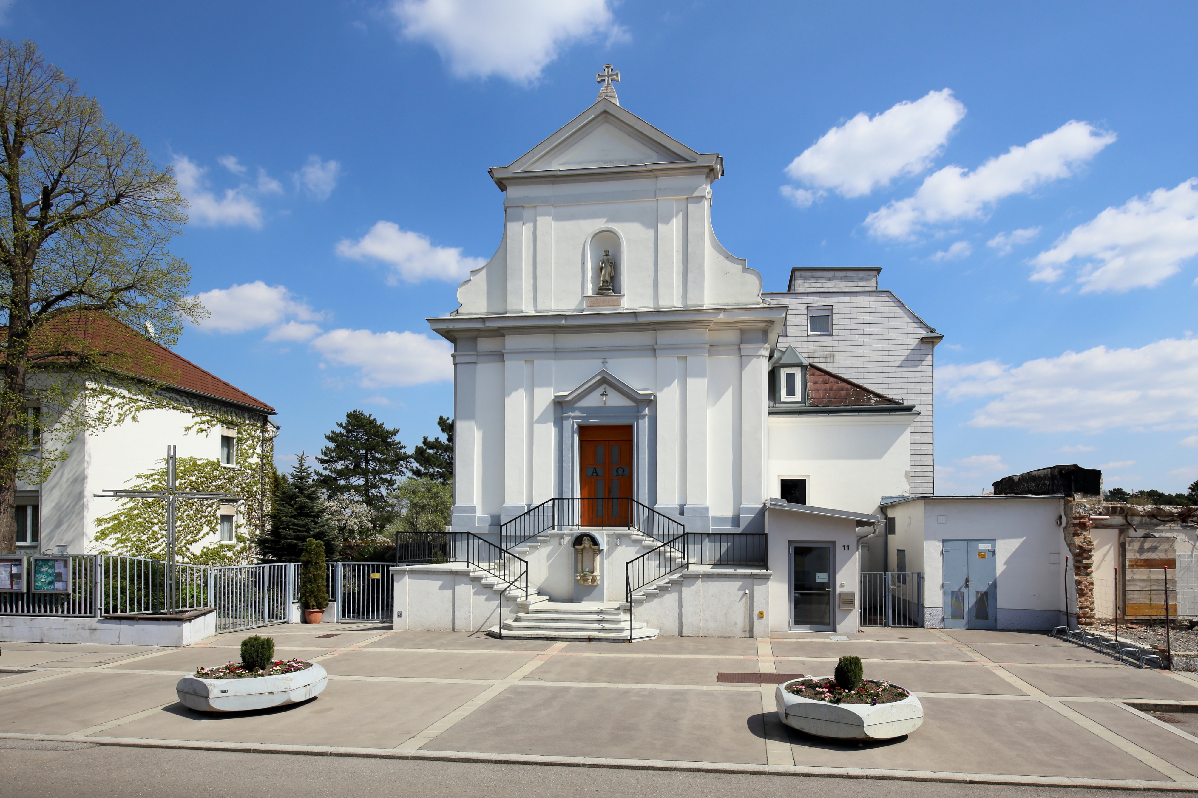 Die Pfarrkirche Herz Jesu im 21. Wiener Gemeindebezirk Floridsdorf. Die Kirche wurde in den 1920er Jahren nach den Plänen von Bruno Buchwieser errichtet und am 29. Juni 1928 geweiht.